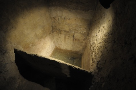 Una imatge de la Mina d'Aigua.